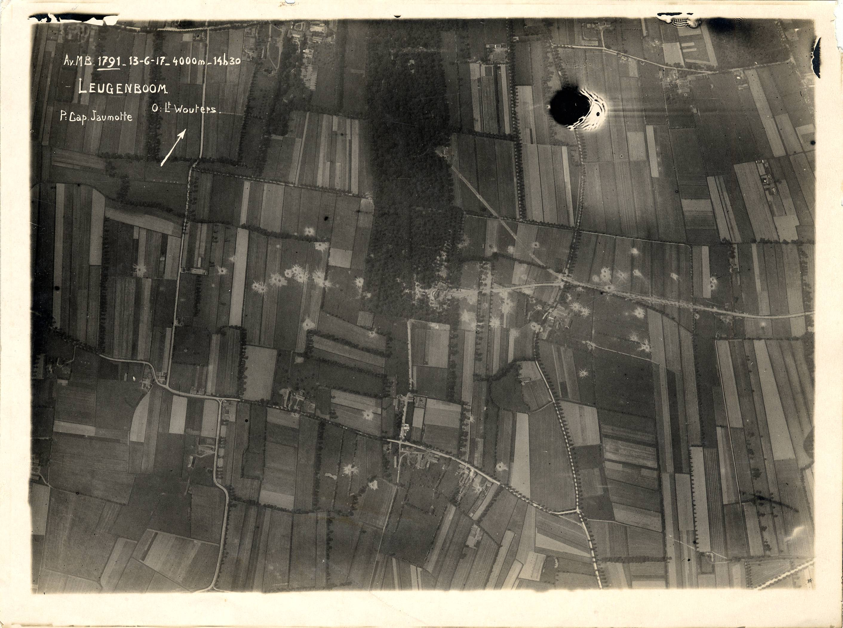 "Av MB 1791, 13/06/17, 4000m, 14h30, LEUGENBOOM, pil: Capitaine Jaumotte, obs: lieutenant Wouters, "au centre la pièce qui tuait Dunkerque". 13 juin 1917. Guerre 1914-1918. Au centre de la photo on peut voir le canon qui bombardait Amiens (Somme).